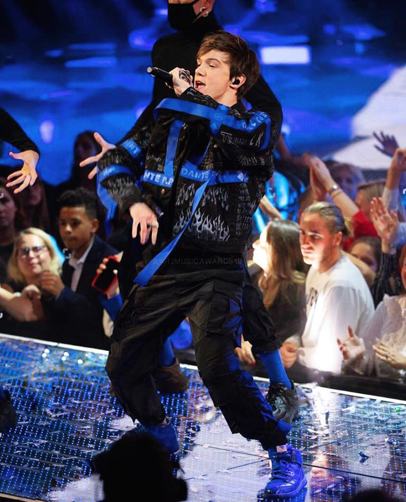 Prestation NMA